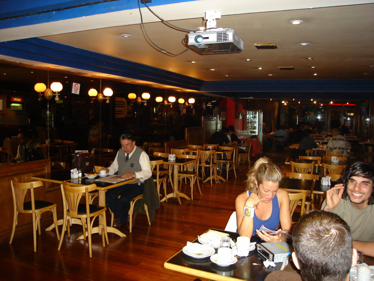 Cafetería del Hotel Bauen